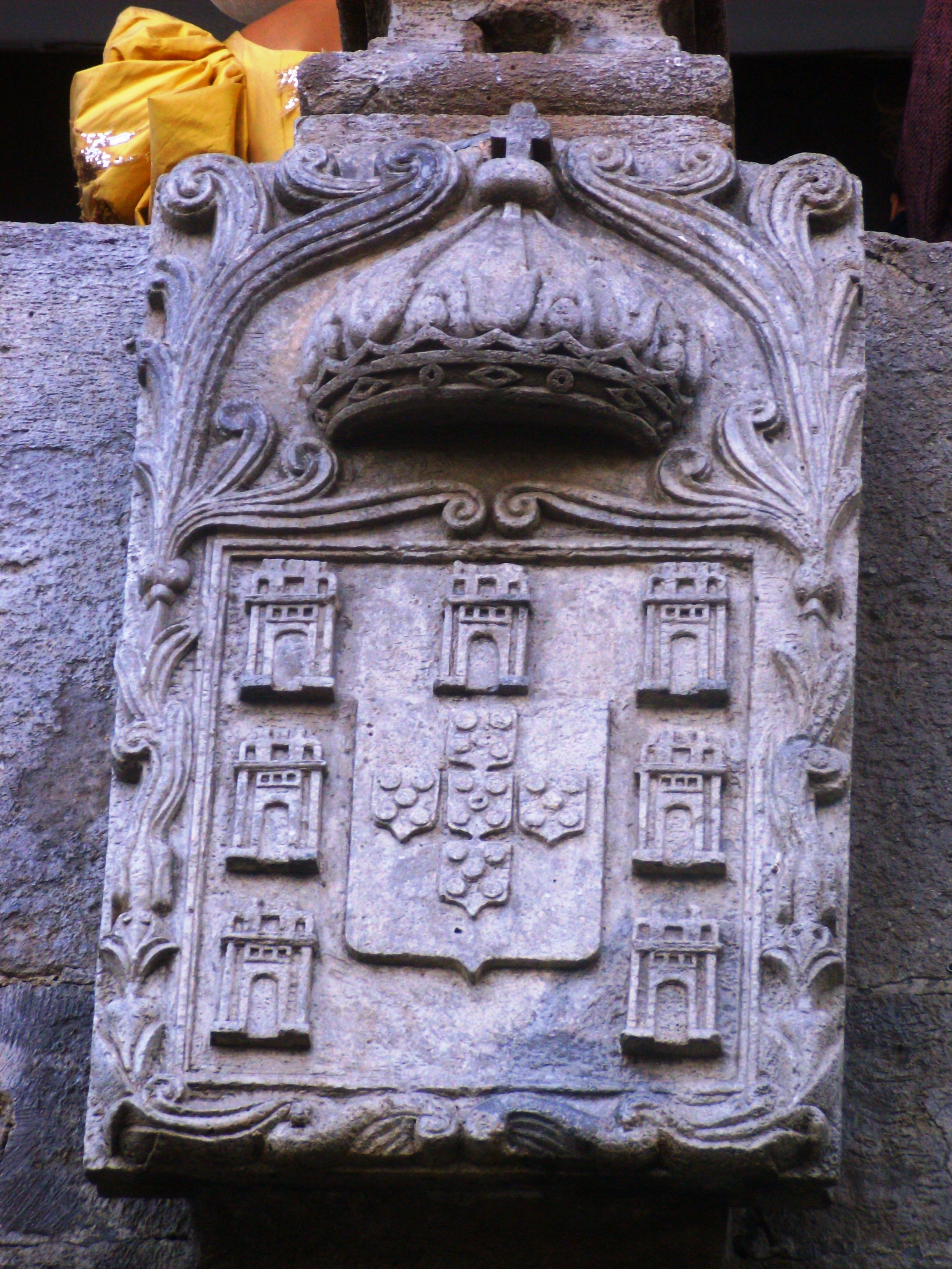 Câmara Municipal de Praia da Vitória, ilha Terceira, Açores: brasão de armas.